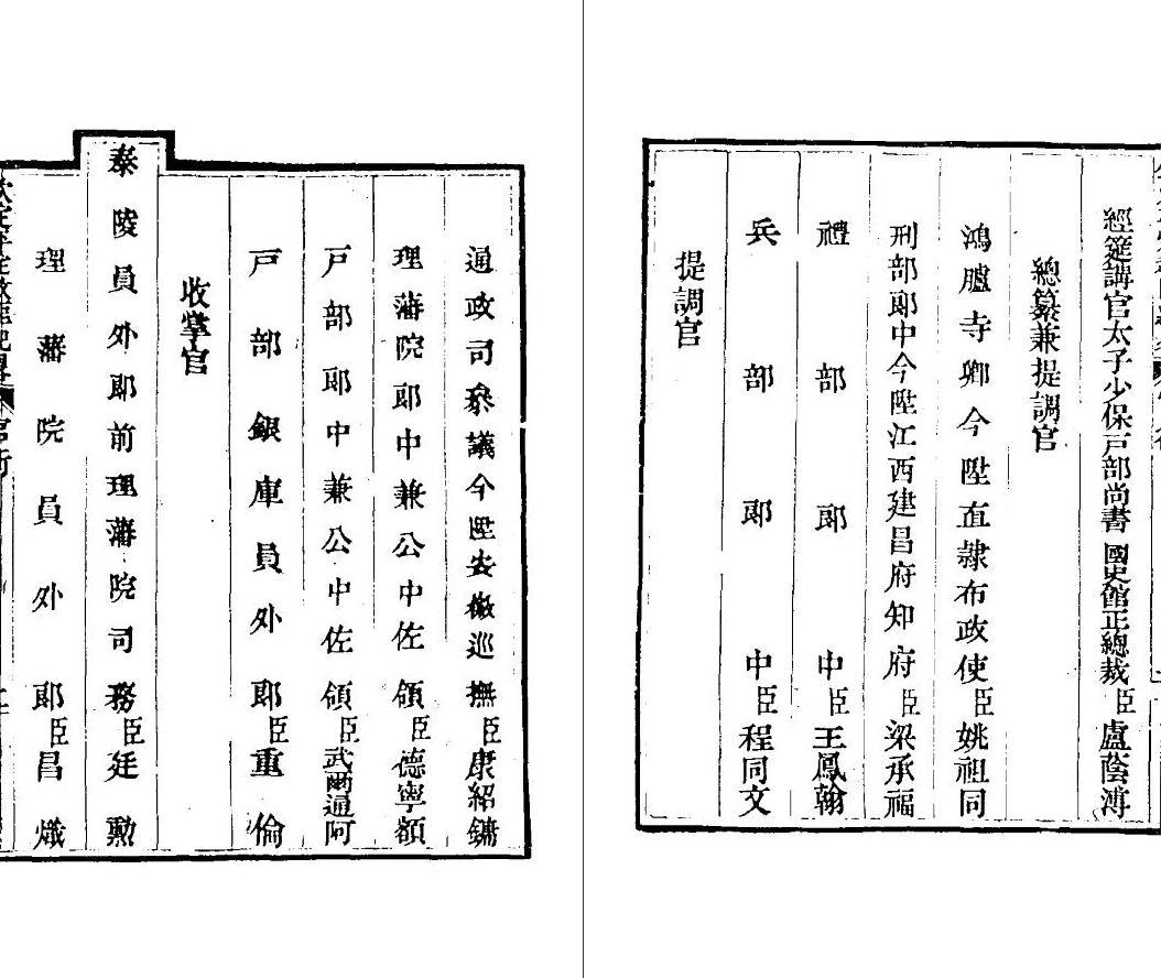 欽定平定教匪紀略 Qinding pingding jiaofei jilue（Imperially Approved Account on Quelling down the Religious Bandits）